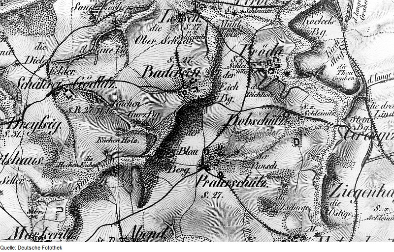 Original image description from the Deutsche Fotothek Leuben-Schleinitz-Pröda. Oberreit, Sect. Freiberg, vor 1843